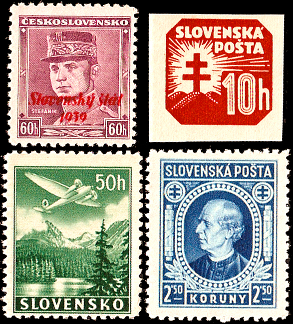 Postage stamps of Slovakia 1939-1945